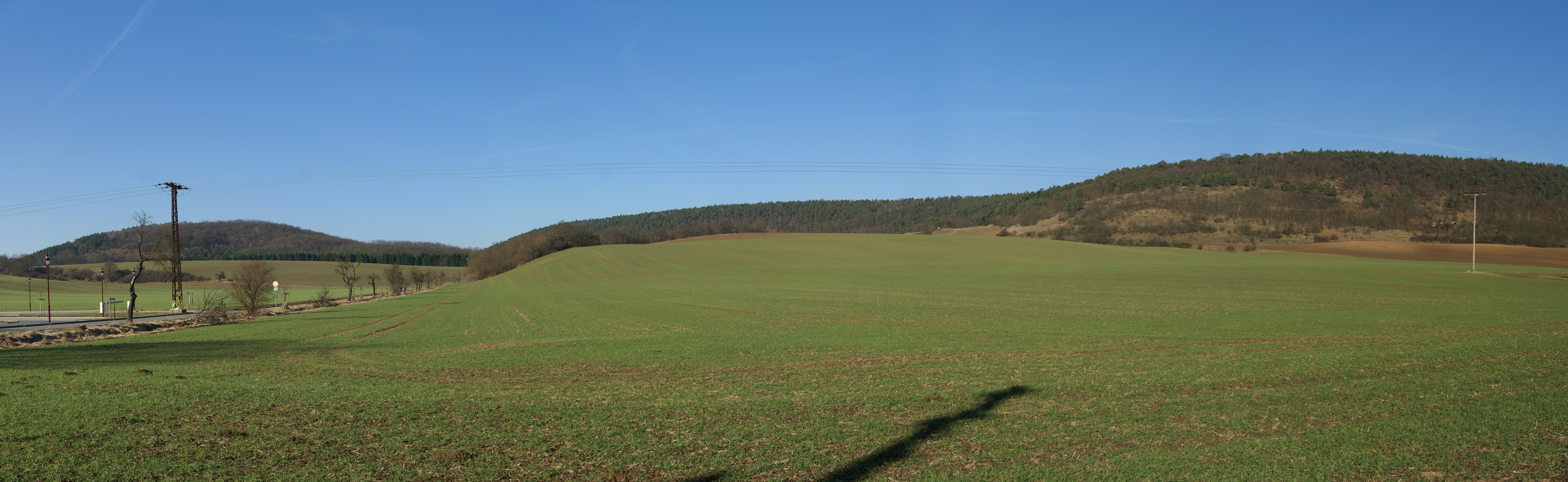 der Ziegelrodaer Forst bei der Arche Nebra bei Wangen